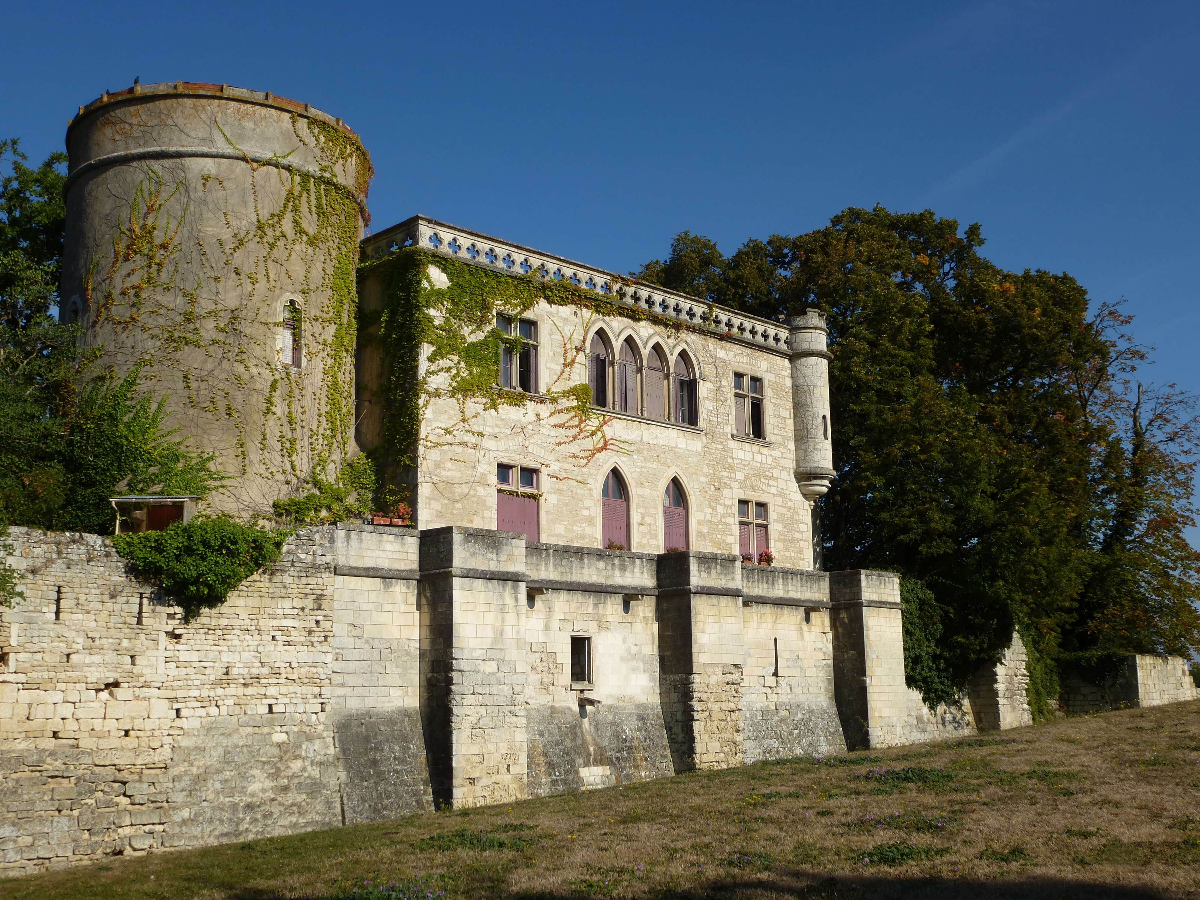 ancienne abbaye bénédictine